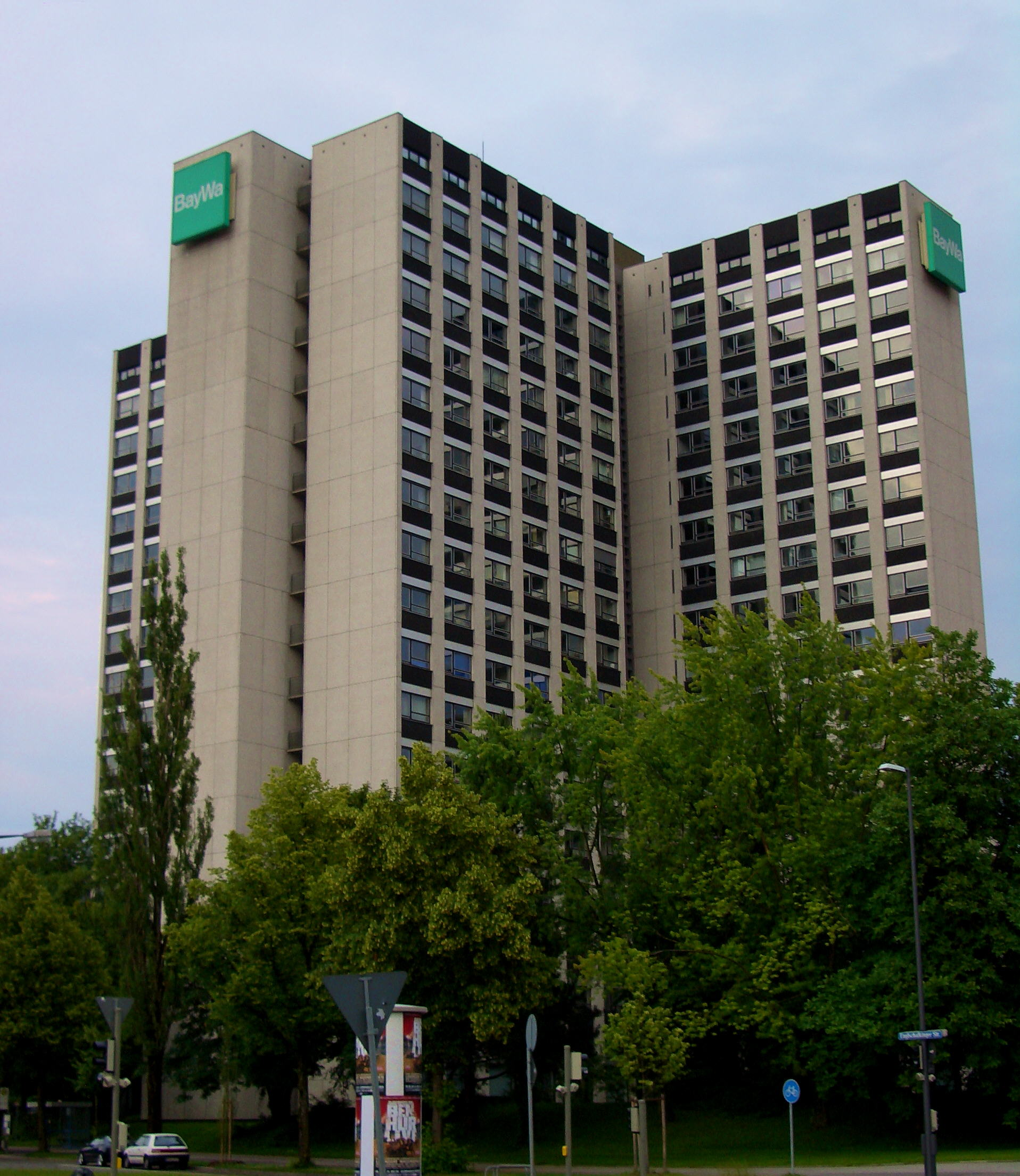 Sternhaus München Arabellapark von Nordwesten